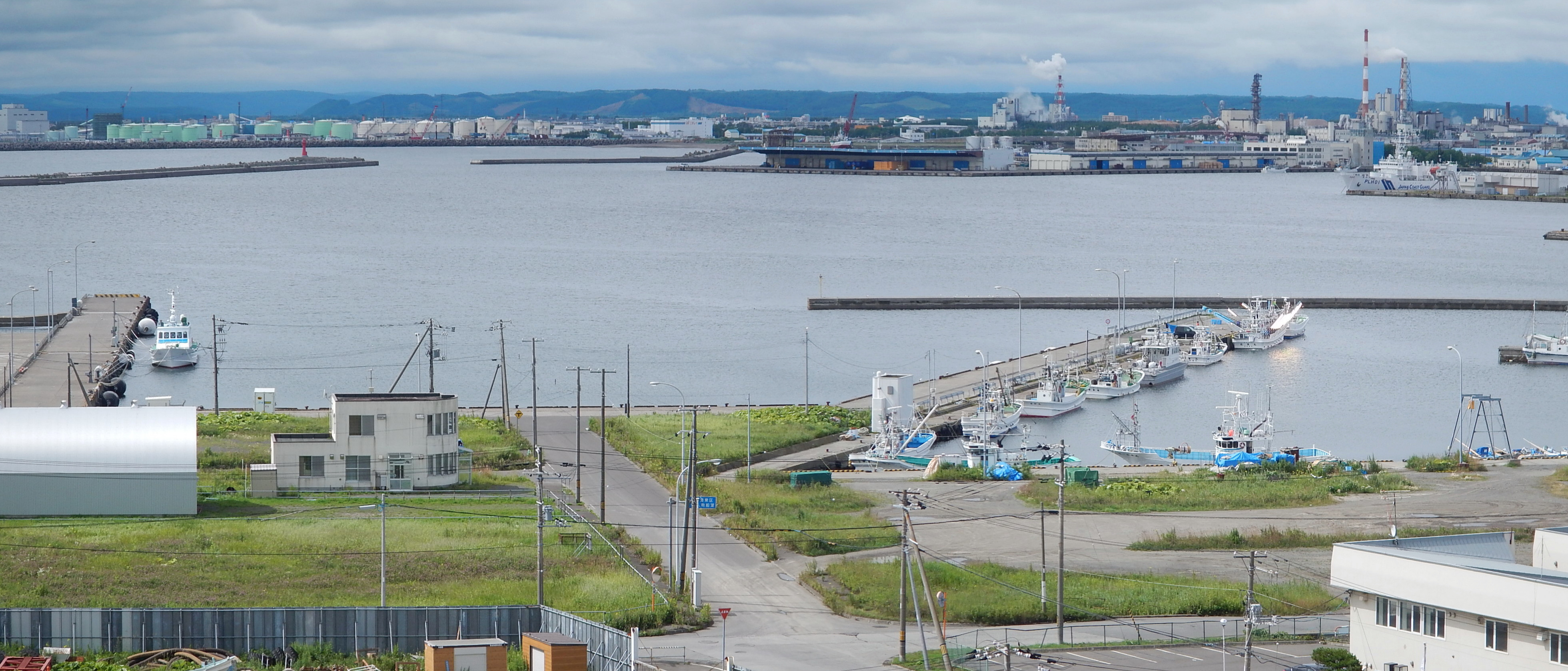 釧路港 米町公園より